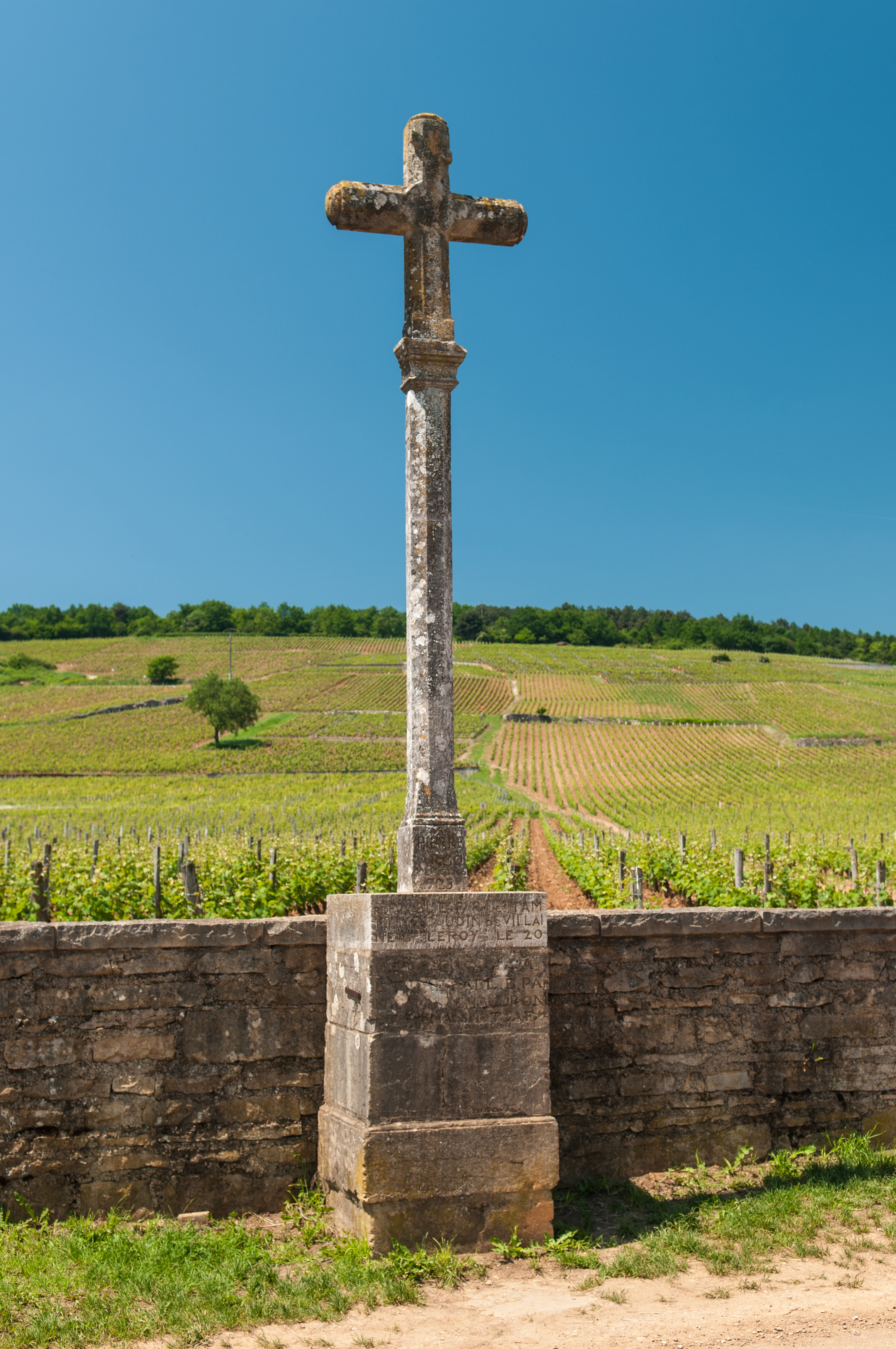 Domaine de la Romanée-Conti